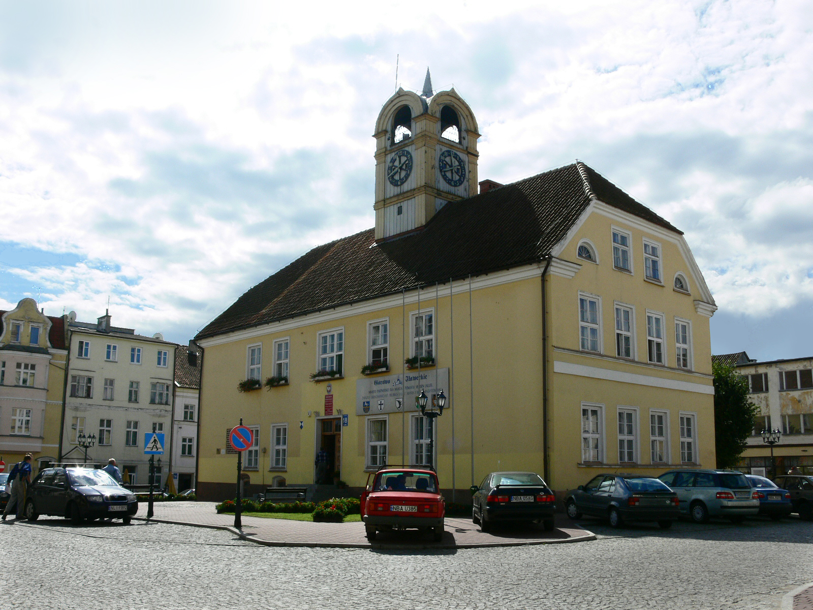 Górowo Iławeckie - Ratusz